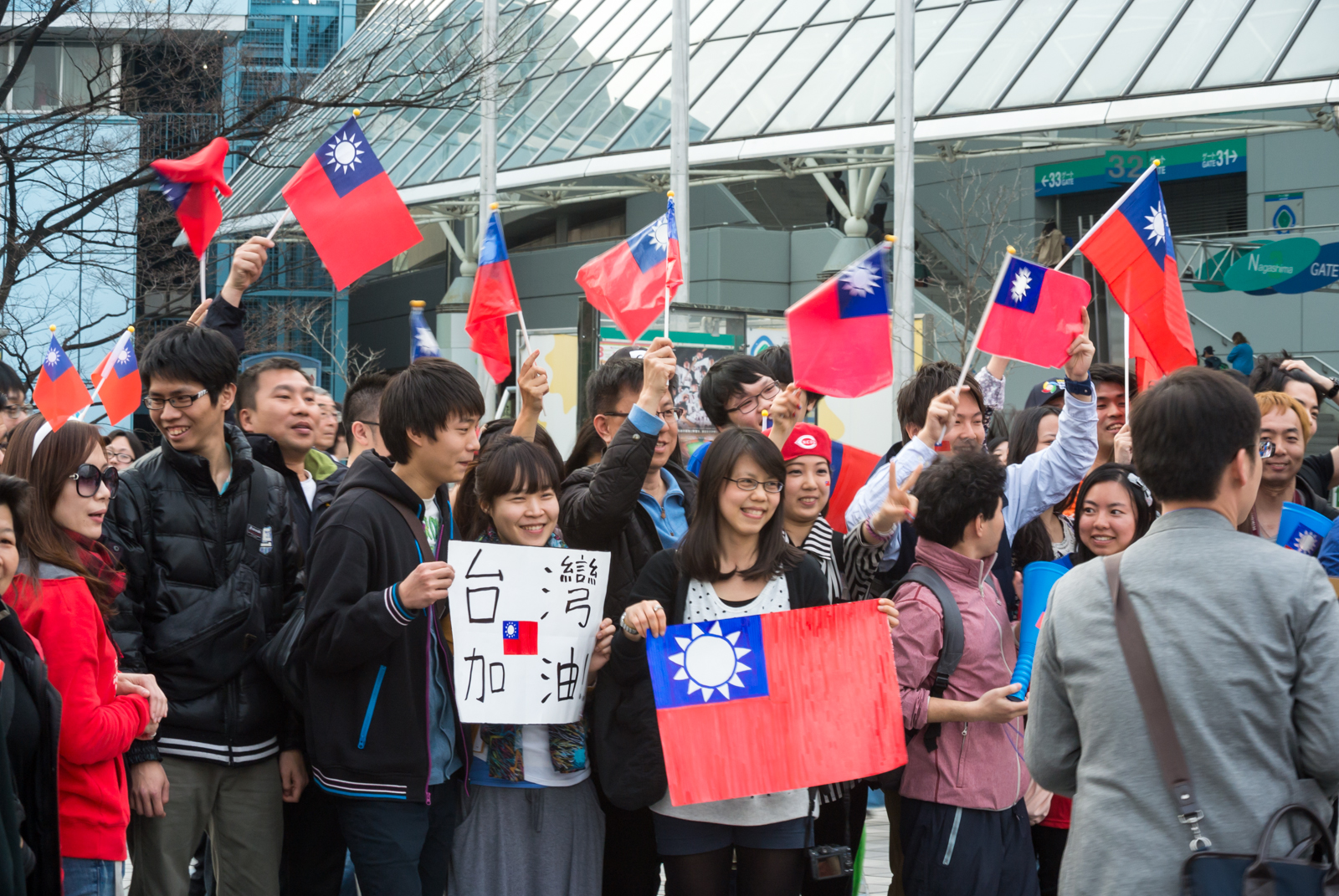 中文（台灣）: 東京巨蛋棒球場外持中華民國國旗為臺灣加油的球迷們